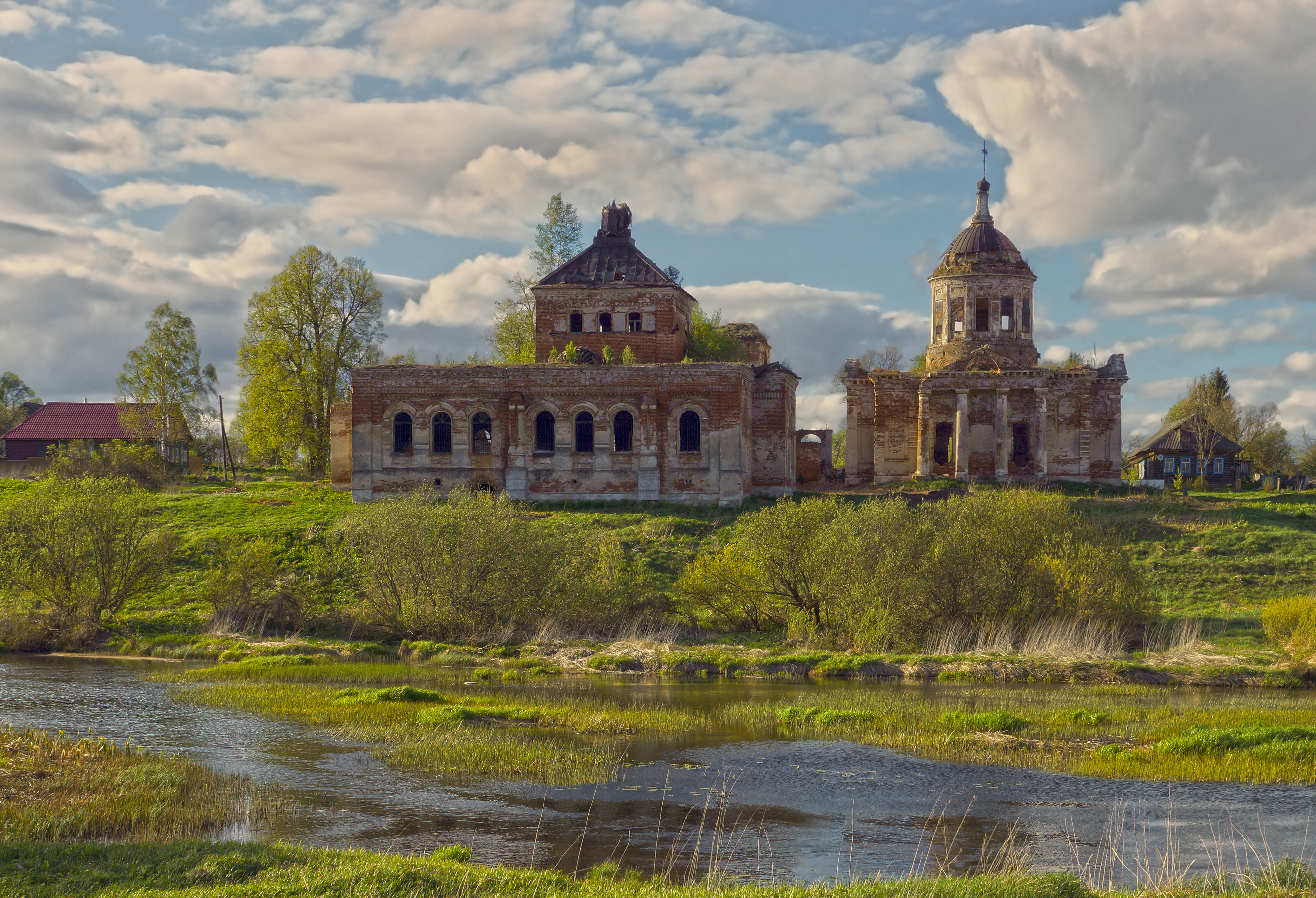 Храмовый комплекс: Кунгалово, Торжокский район, Тверская область